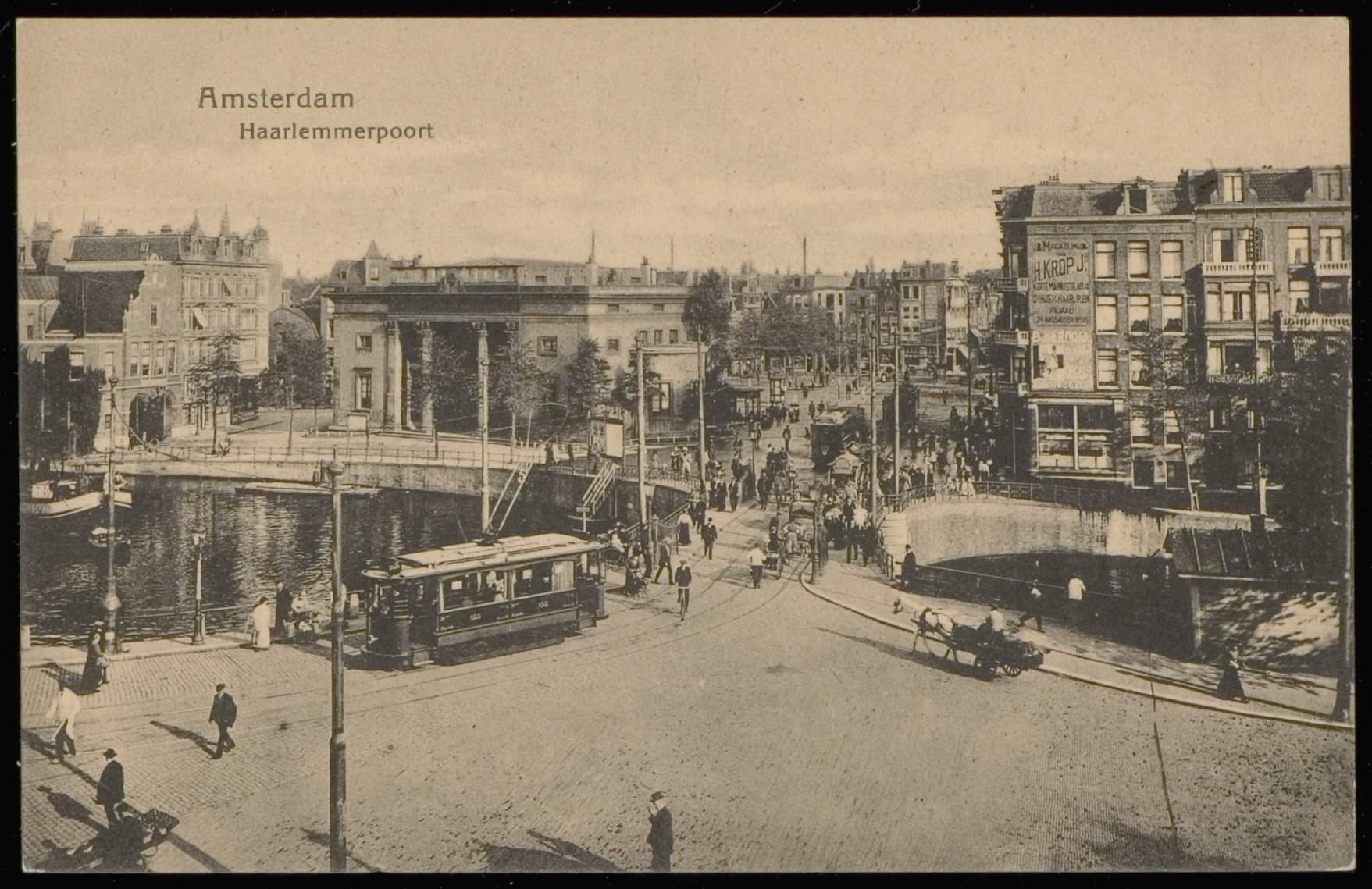 Beschrijving: Haarlemmerpoort, Haarlemmerplein 50Brug over de Singelgracht met op de voorgrond het Nassauplein, rechts de Korte Marnixkade met op de achtergrond het Haarlemmerplein. Uitgave Weenenk & Snel, Den HaagDocumenttype: prentbriefkaartVervaardiger: Weenenk en SnelCollectie: Collectie Stadsarchief Amsterdam: prentbriefkaartenDatering: 1910 ca.Geografische naam: SingelgrachtKorte MarnixkadeNassaupleinHaarlemmerpleinInventarissen: PBKD00074000001G